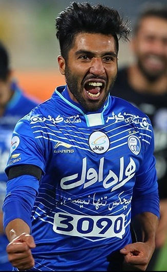 دیدار تیم‌های فوتبال استقلال و صبا - جام حذفی